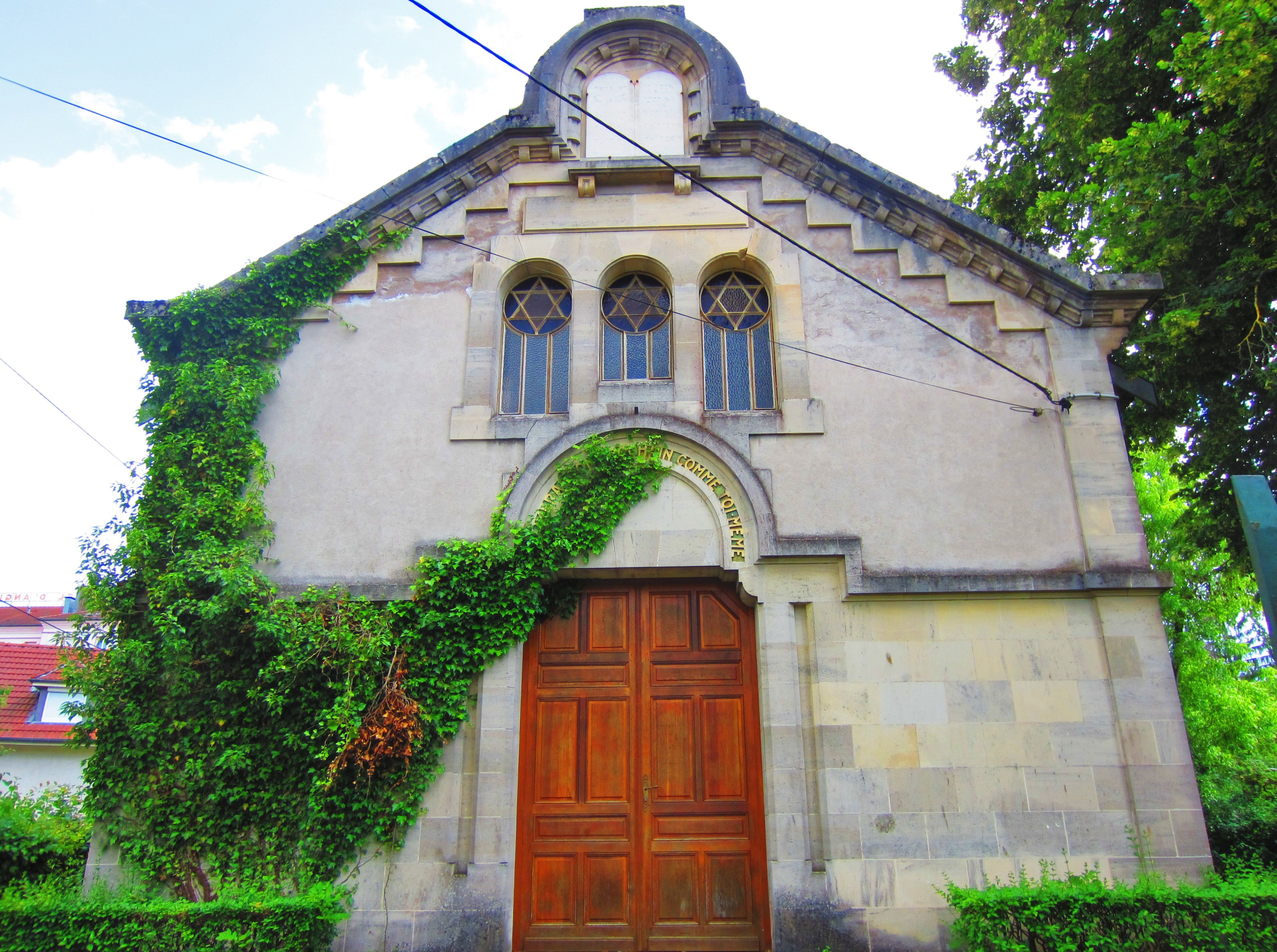 Synagogue Vittel